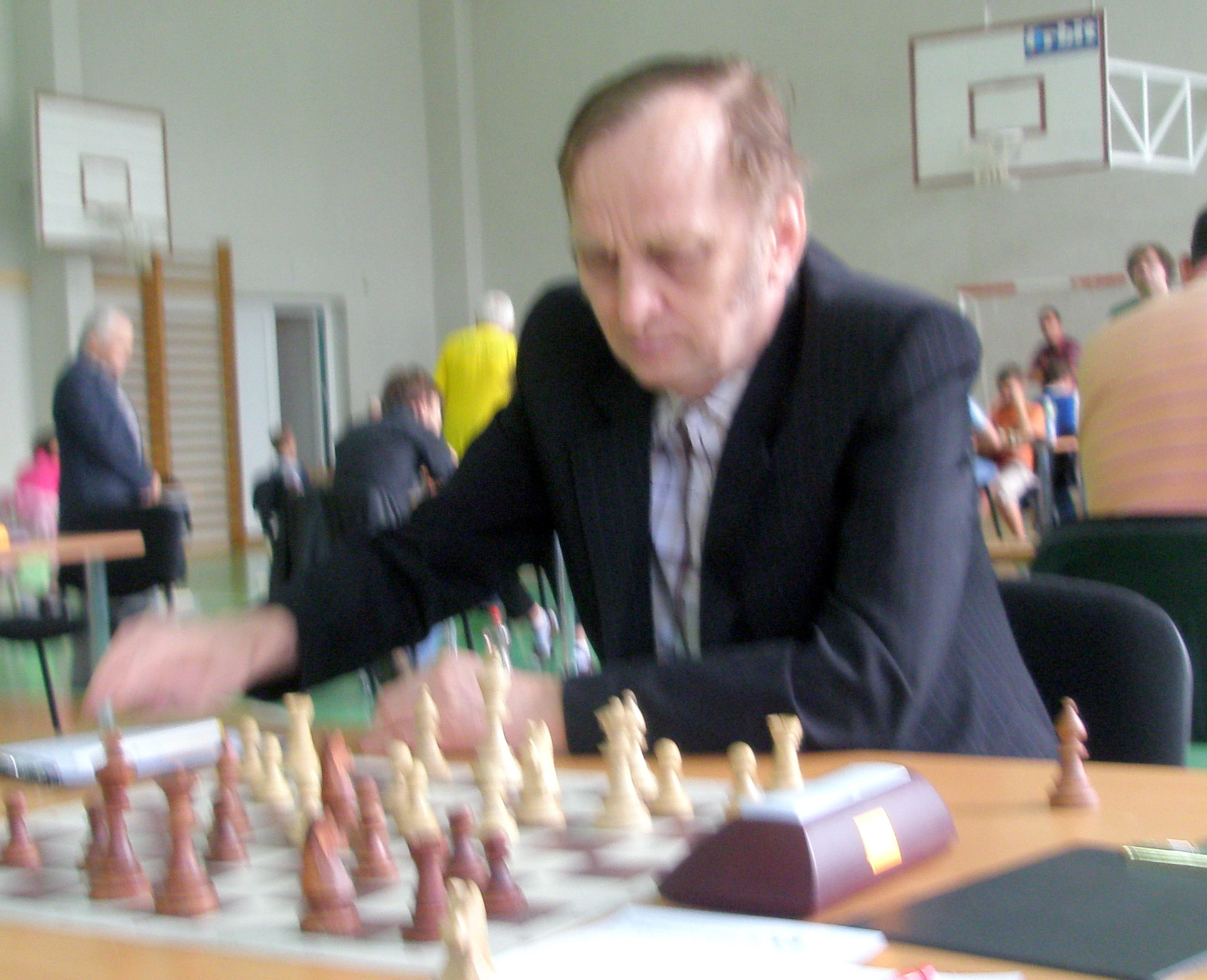 Gintautas Petraitis Klaipėdos šachmatų festivalyje, 2010 liepos 28 d.